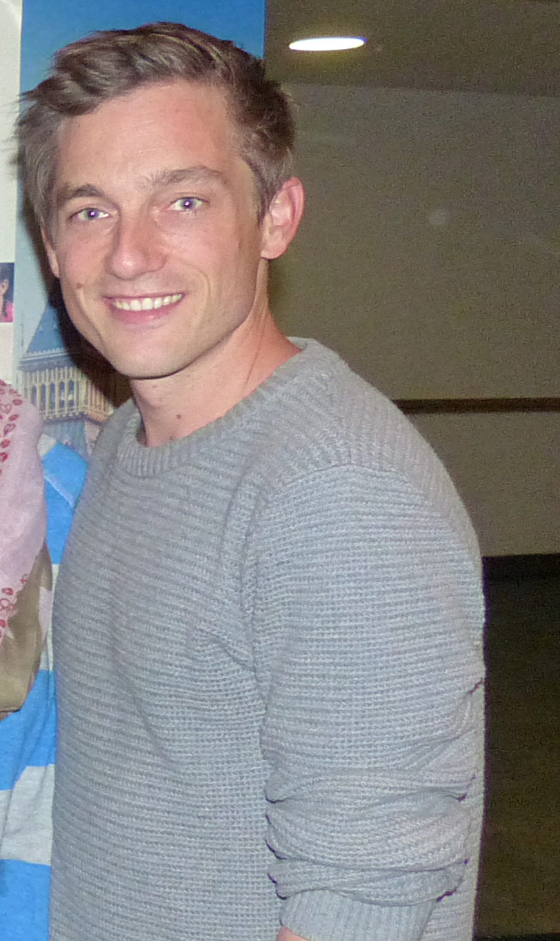 Volker Bruch, Hin und weg Kinotour-Dortmund 2014